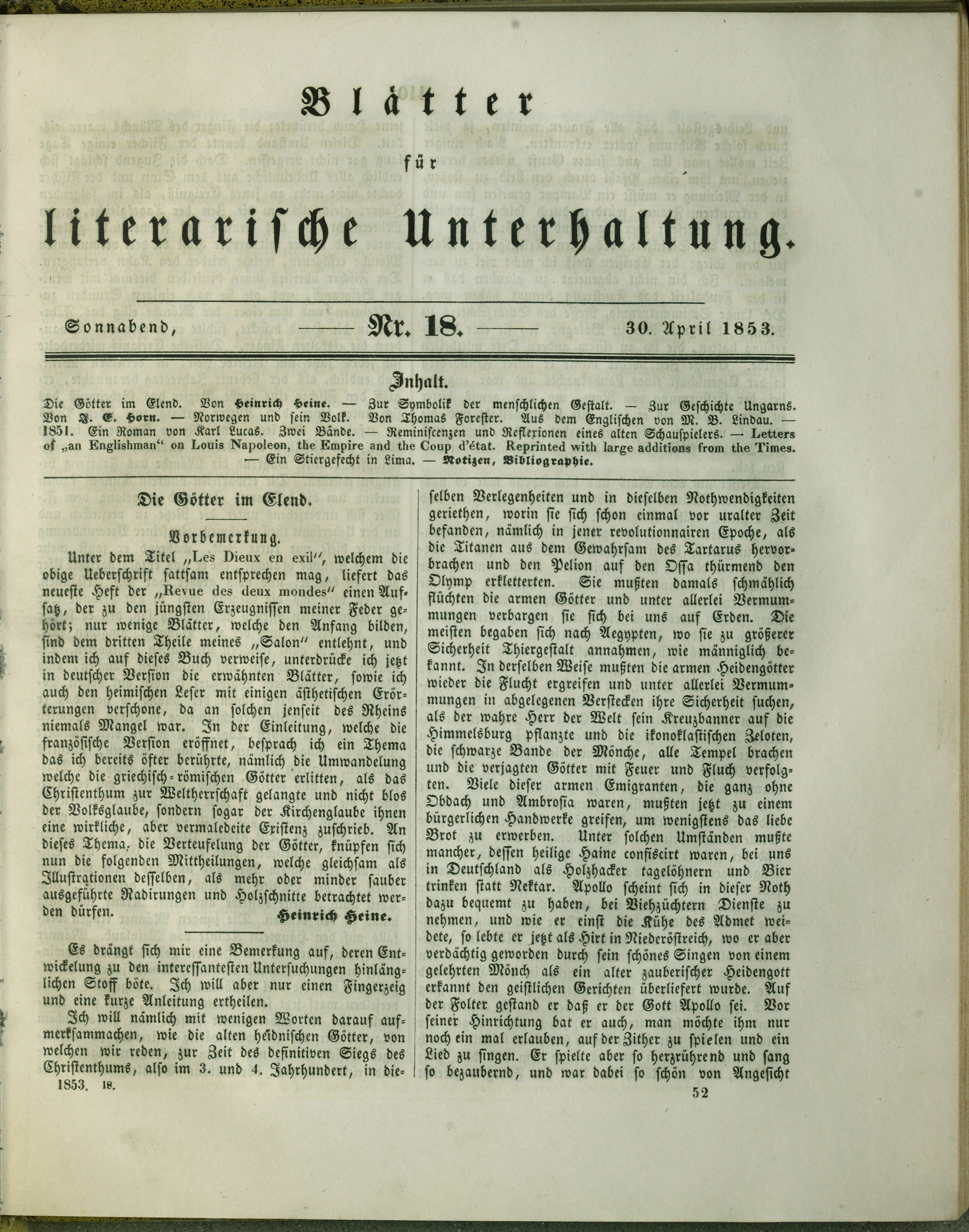 Zeitschriftenfassung von Heinrich Heines' Die Götter im Exil. (Blätter für literarische Unterhaltung Nr. 18, 30. April 1853). Der Titel lautete abweichend Die Götter im Elend